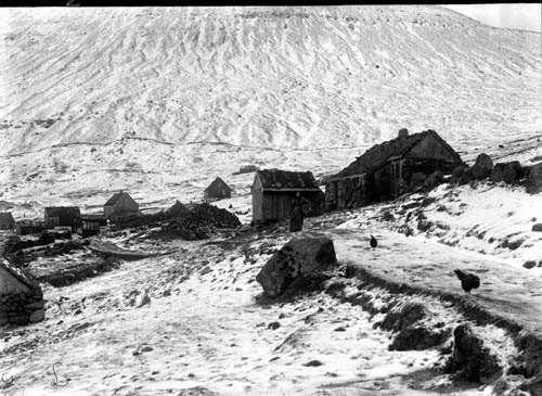 Fuglafjørður, "Máin", Faroe Islands